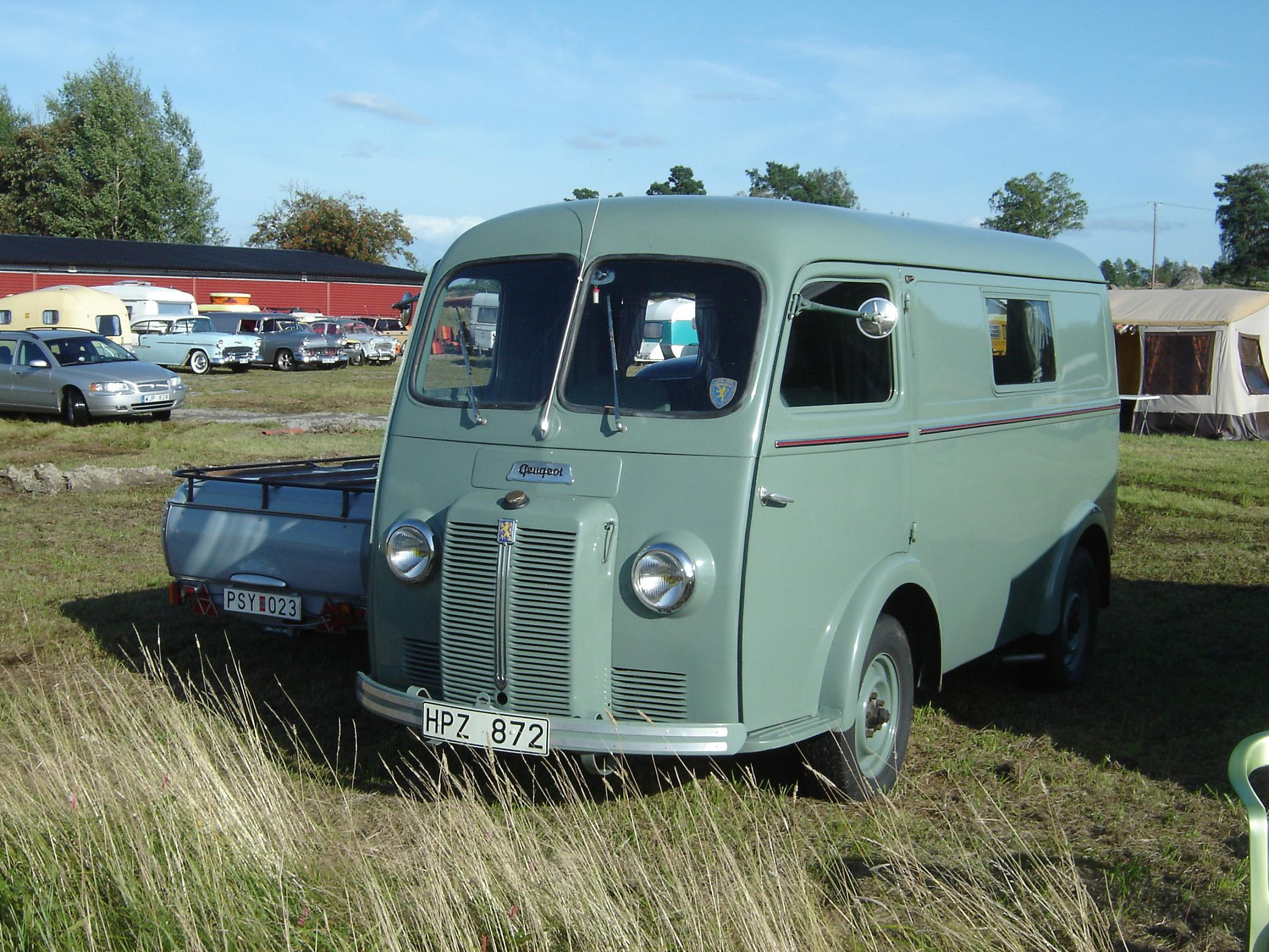 Peugeot